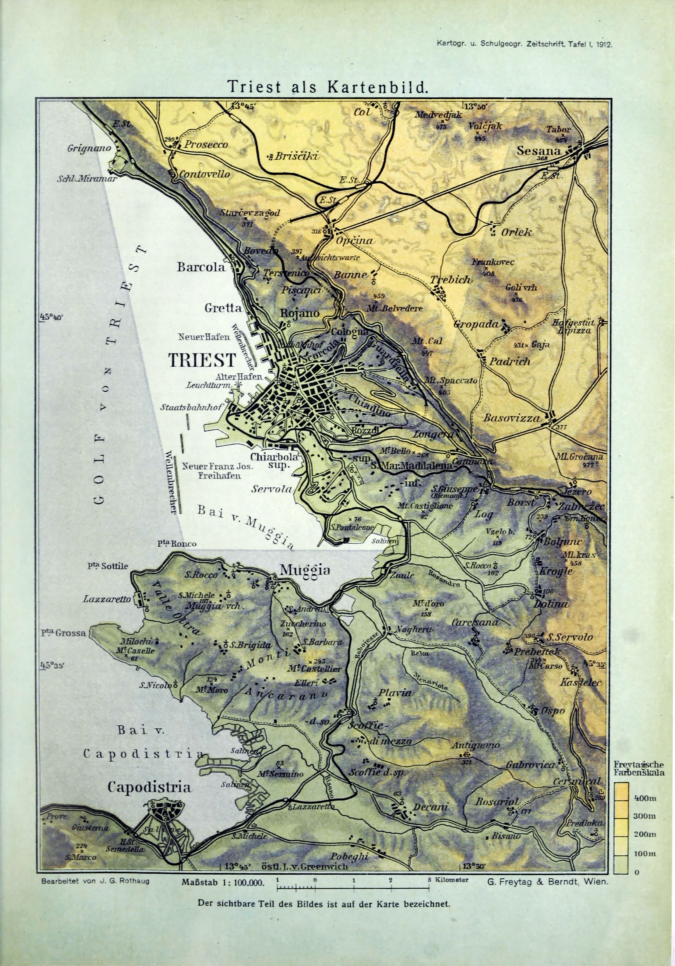 Triest als Kartenbild; Verkehrslage Eisenbahn